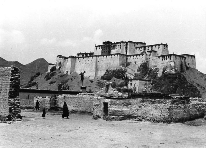 Schigatse, Burg